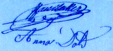 Ënnerschrëft vum Jos Faulbecker a senger Fra Anna Dold (Etat civil, ville de Luxembourg, acte de mariage, 13.7.1854)